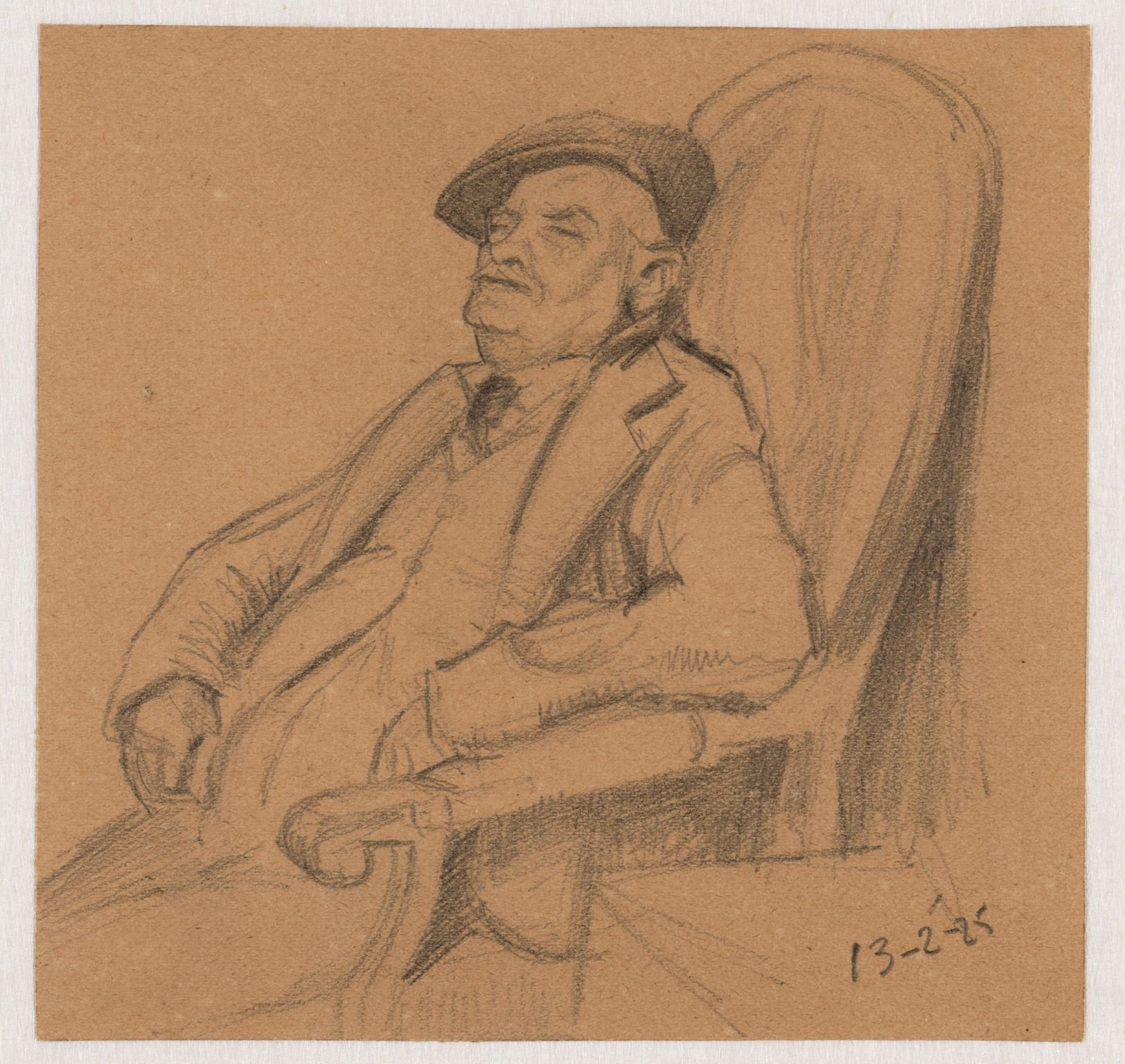 Fré Cohen, tekening 13 februari 1925 Portret van Levie Cohen (1874-1942), vader van de kunstenares, slapend in een leunstoel, naar links. Techniek: potlood De vader van de kunstenares, slapend in een leunstoel, naar links. Techniek: potlood.